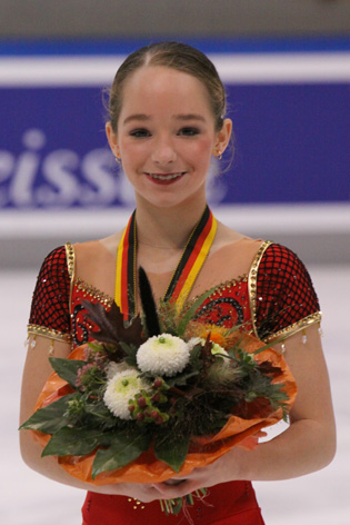 Kiri Baga (USA) at the 2009-2010 JGP Pokal der Blauen Schwerter.